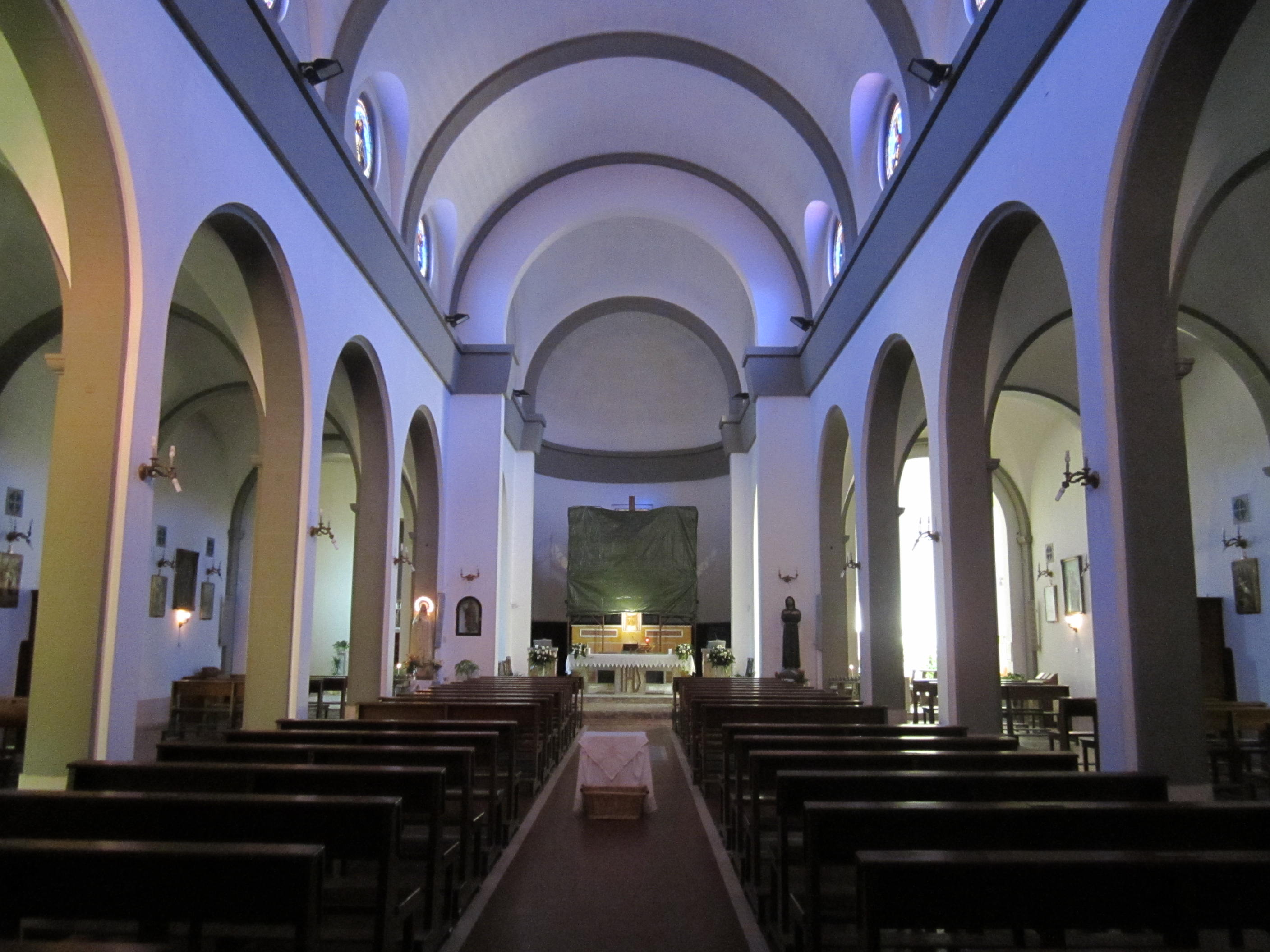 Interno della Chiesa della Santissima Trinità a Livorno